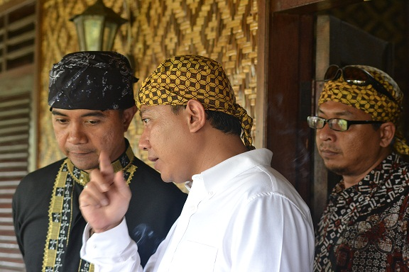 Bagus karyanegara serentaun2